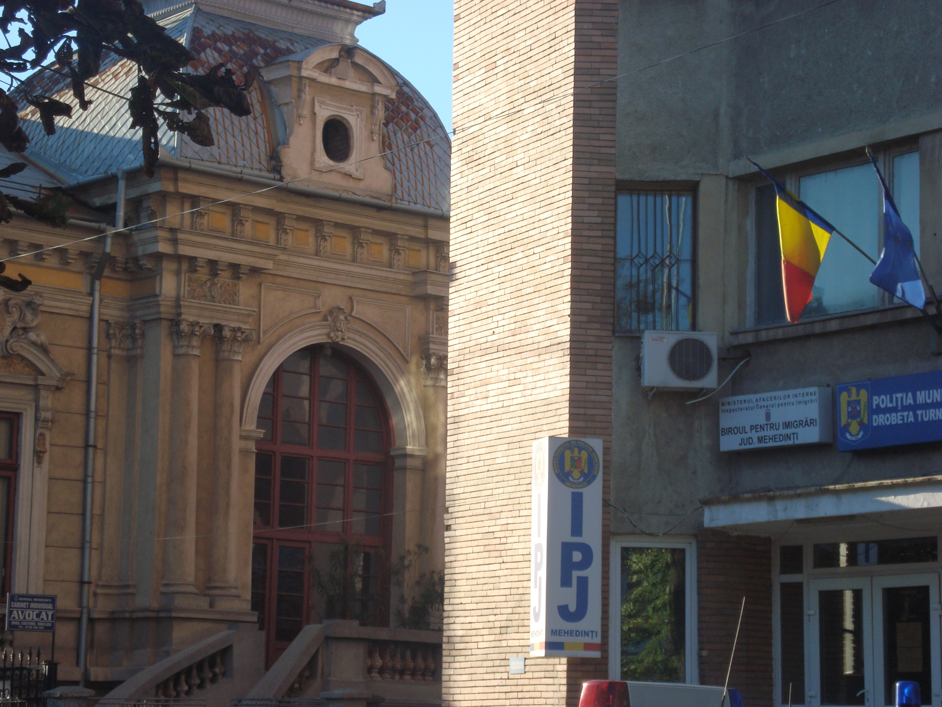 casa istorica